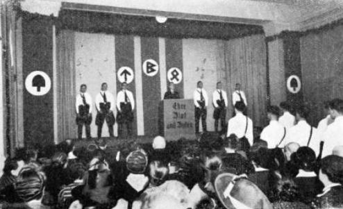 Uniformirani kulturbundovci na zboru Kulturbunda D Celju 31. januarja 1941.Na odru, ki je okrašen z znaki »Ehre, Blut und Boden« govori z zvezni vodja Kulturbunda iz Maribora Johann Baron.